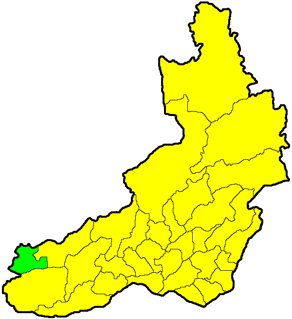 Петровск-Забайкальский район на карте Забайкальского края